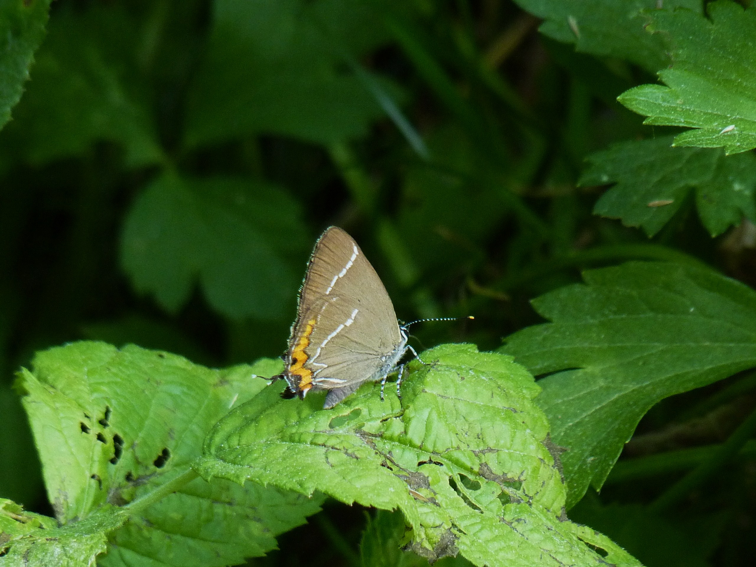 Ulmen-Zipfelfalter (Satyrium w-album)